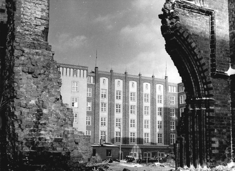 Zentralbild Levermann Westerholz-15.4.1955 Hein-L.- Aufbau von Rostock. Durchblick auf die Straße des Nationalen Aufbauwerkes. Im Vordergrund die Ruinen der Jacobikirche. (aufgenommen Anfang April 1955)